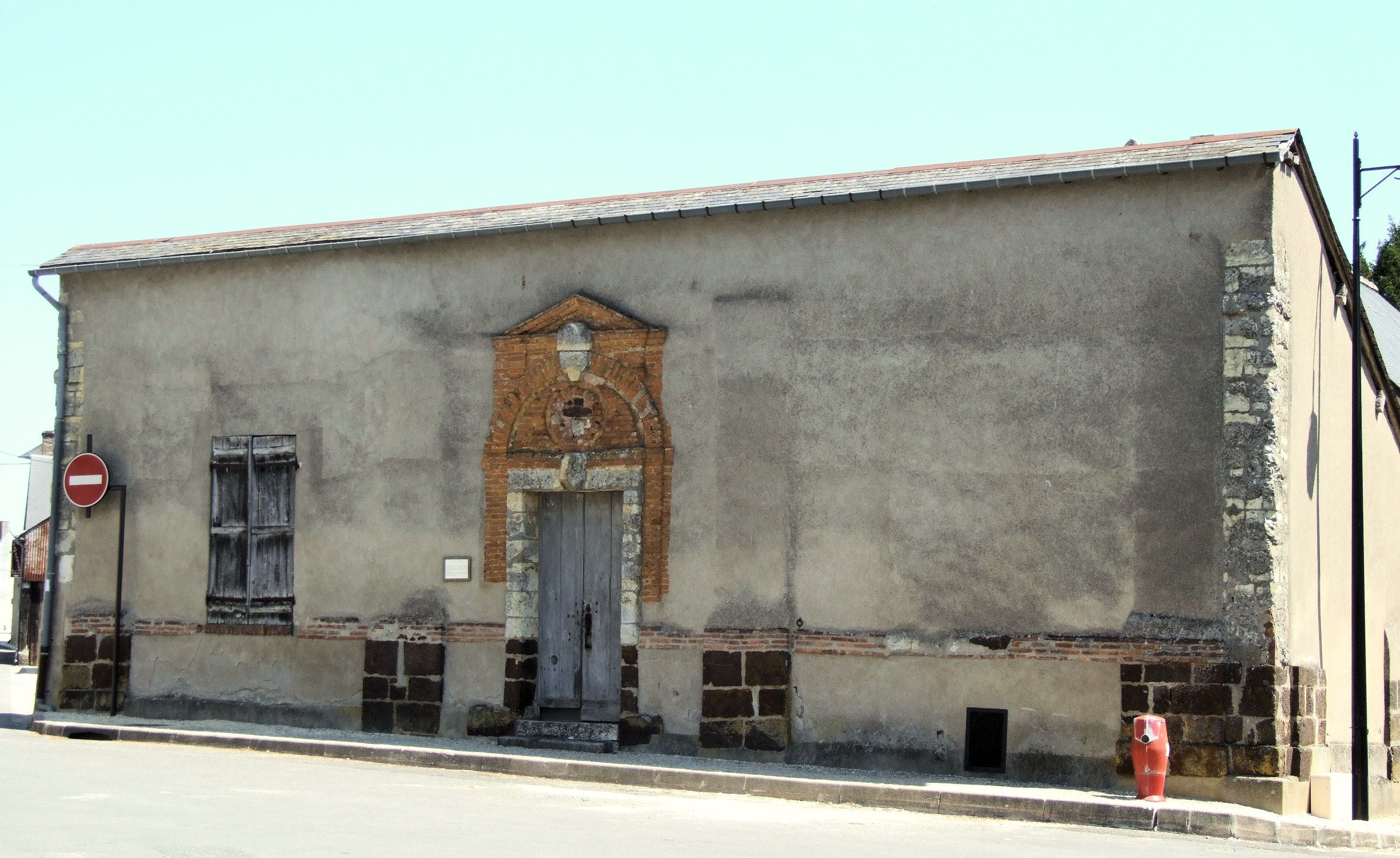 Henrichemont - Ancien hôtel de la Monnaie sur une des places secondaires